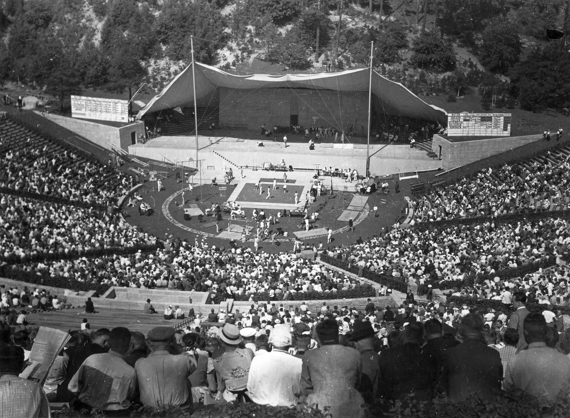 Waldbühne lelátói az 1936. évi nyári olimpiai játékok alatt. Location: Germany, Berlin Tags: Berlin Olympics, Olympics Title: Waldbühne lelátói az 1936. évi nyári olimpiai játékok alatt.